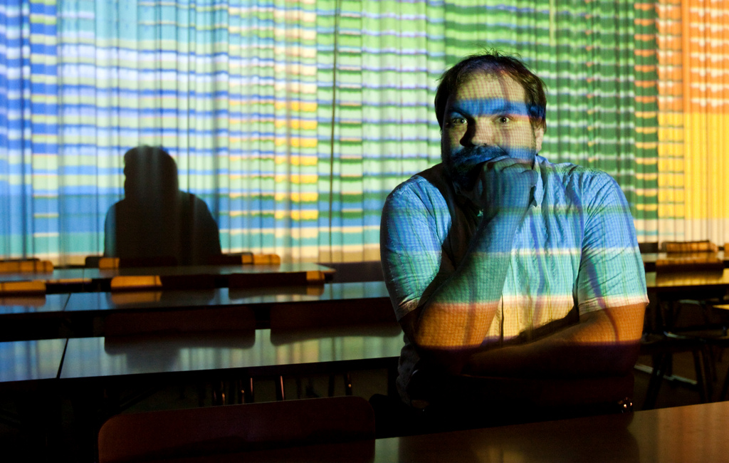 Evolutsioonigeneetik Mait Metspalu 1. märtsil 2011 Tartus TÜ MRI hoones Riia tänav 23b.